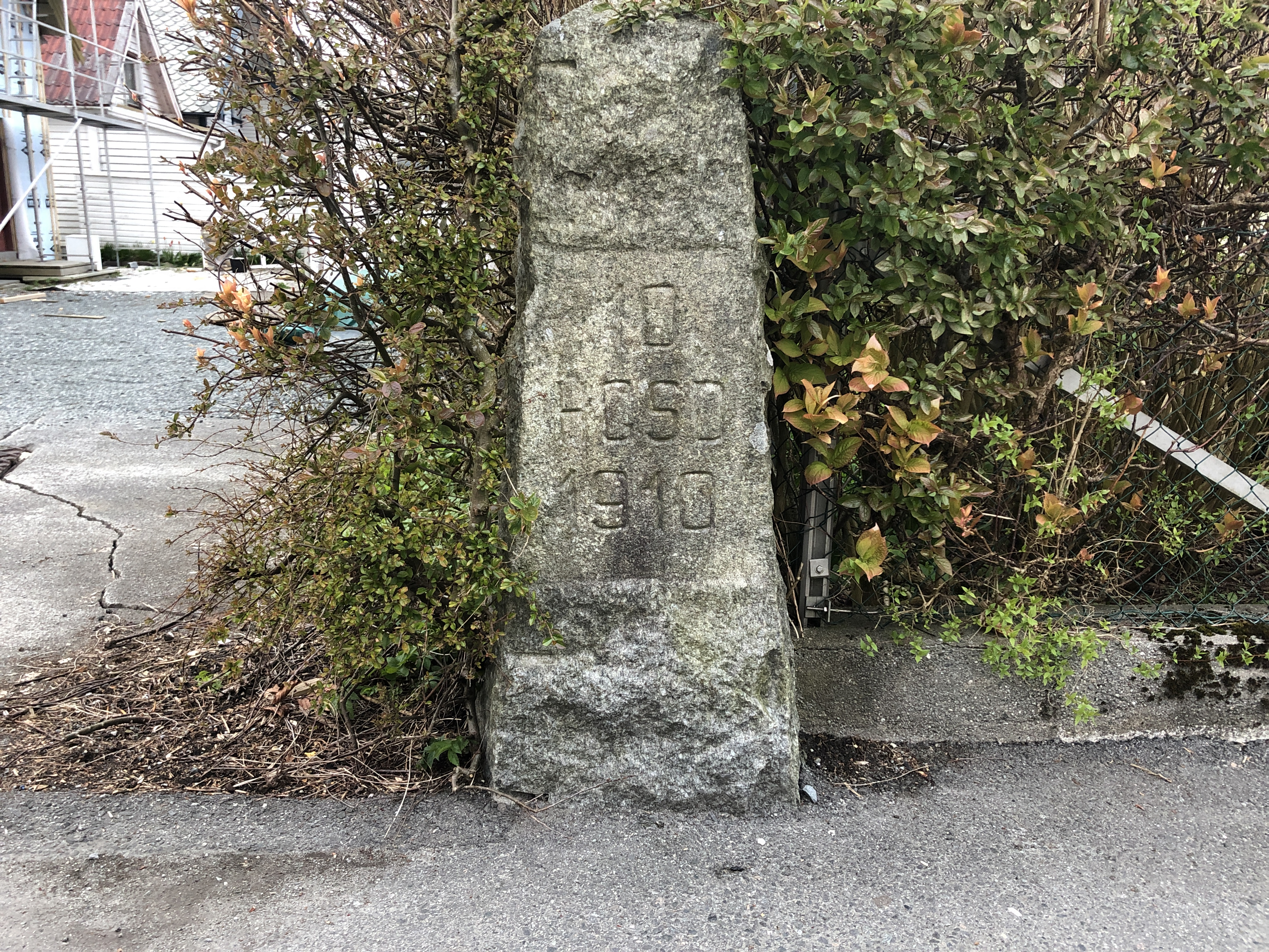 Grensestein mellom Haugesund og Skåre